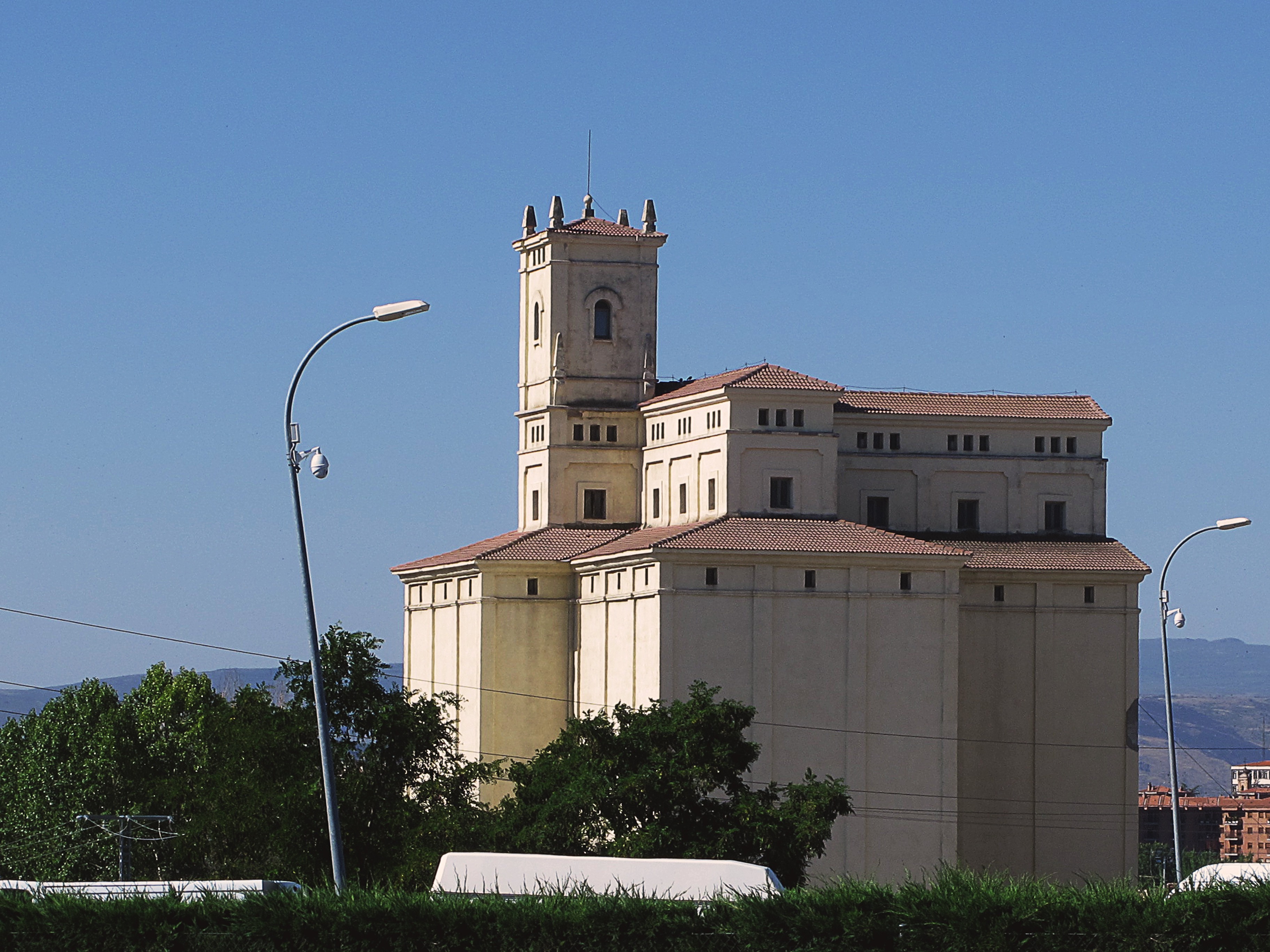 Silo Norte dentro de las instalaciones de "Fadisa" ahora instalaciones de Nisan de Avila